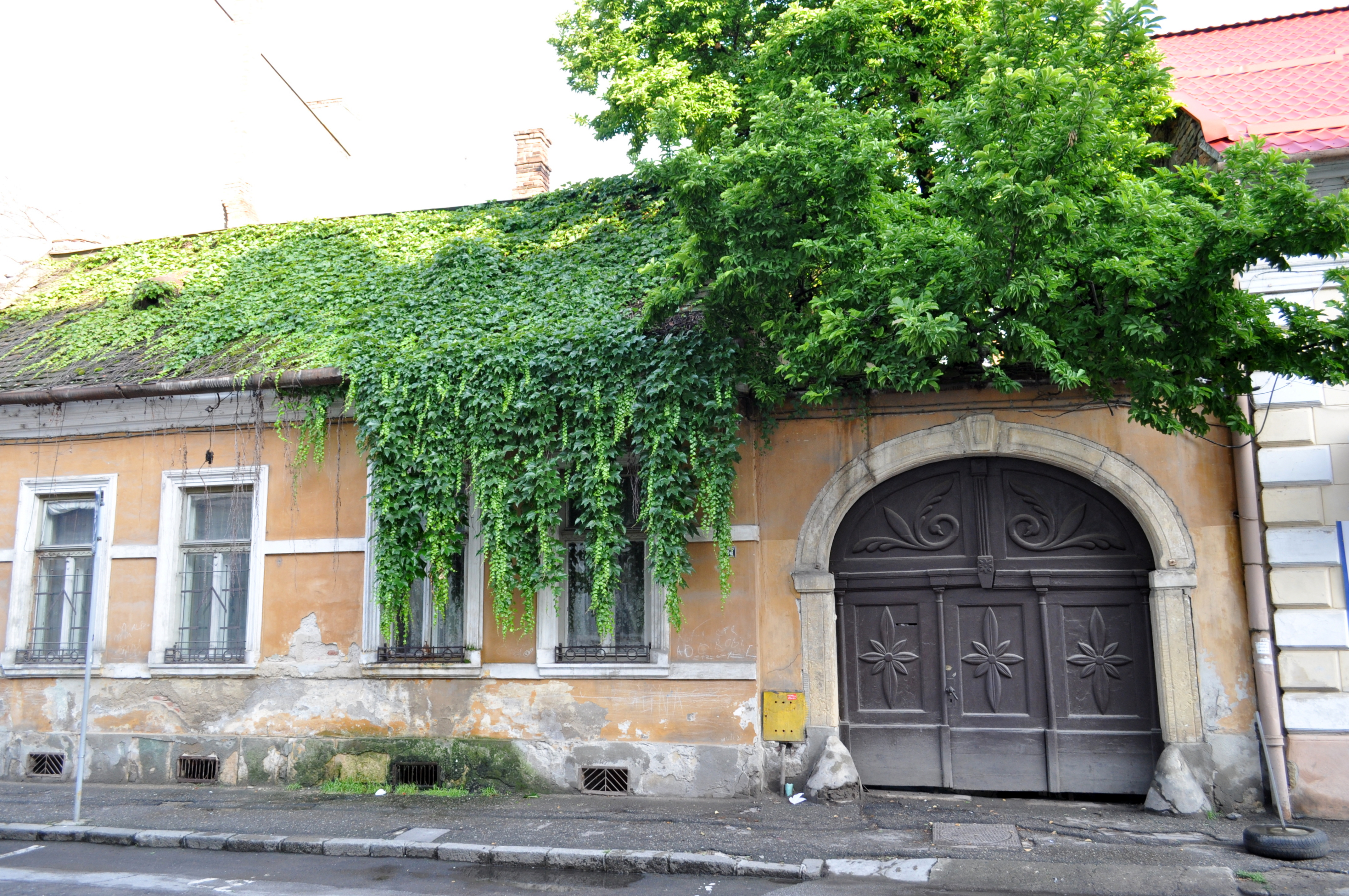 Casă monument strada I.C.Brătianu nr.34